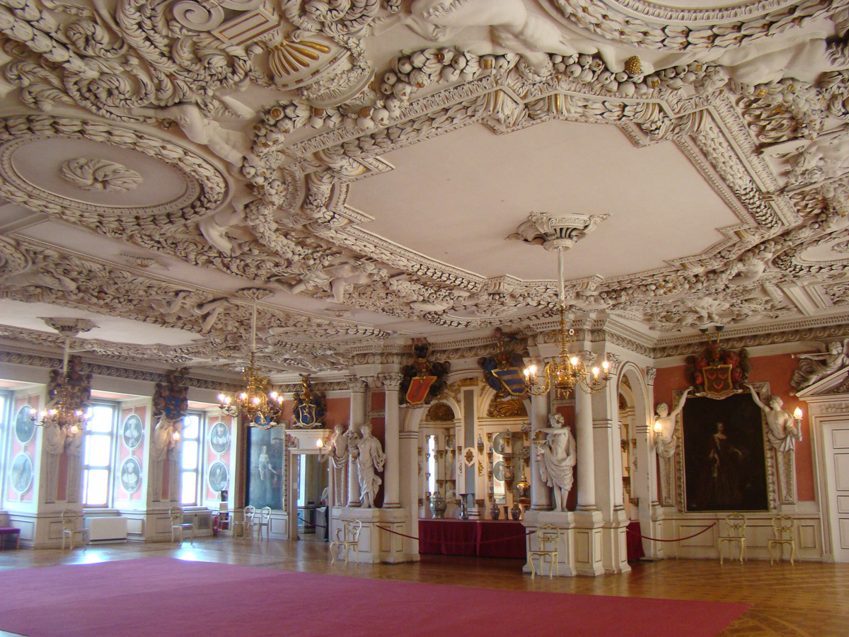 Interieur, Schlossmuseum Gotha, Schloss Friedenstein